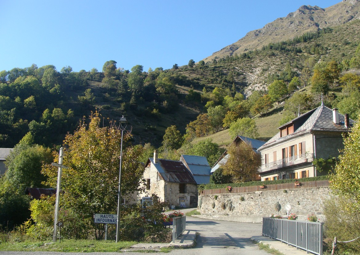 Le hameau des Infournas-hauts (commune de Saint-Bonnet-en-Champsaur) vu de la route d'accès.